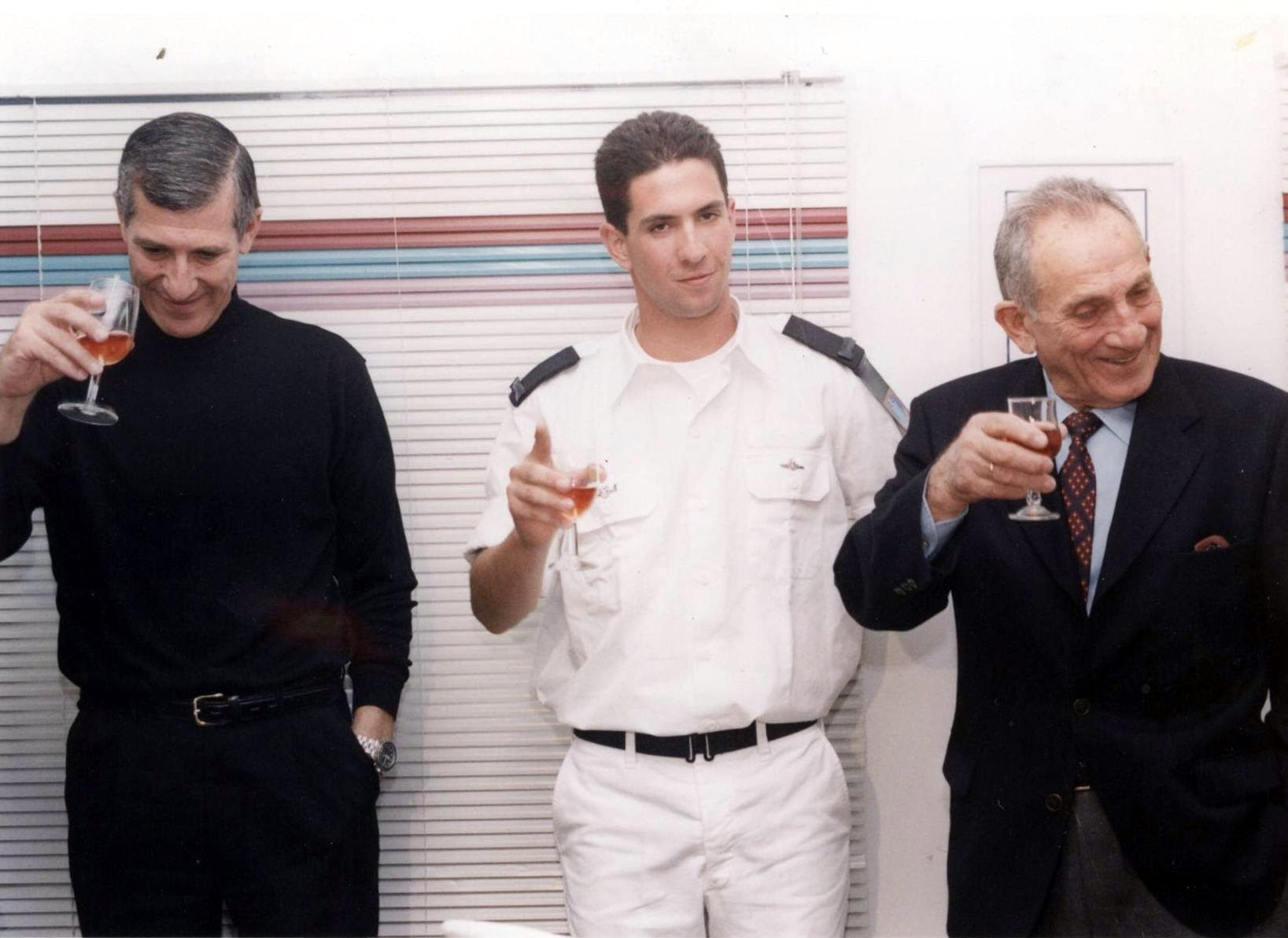 אלוף שלמה אראל, אל"מ מיל' אהוד אראל עם הנכד והבן סג"מ יאיר אראלבסיימו את קורס החובלים 1988.